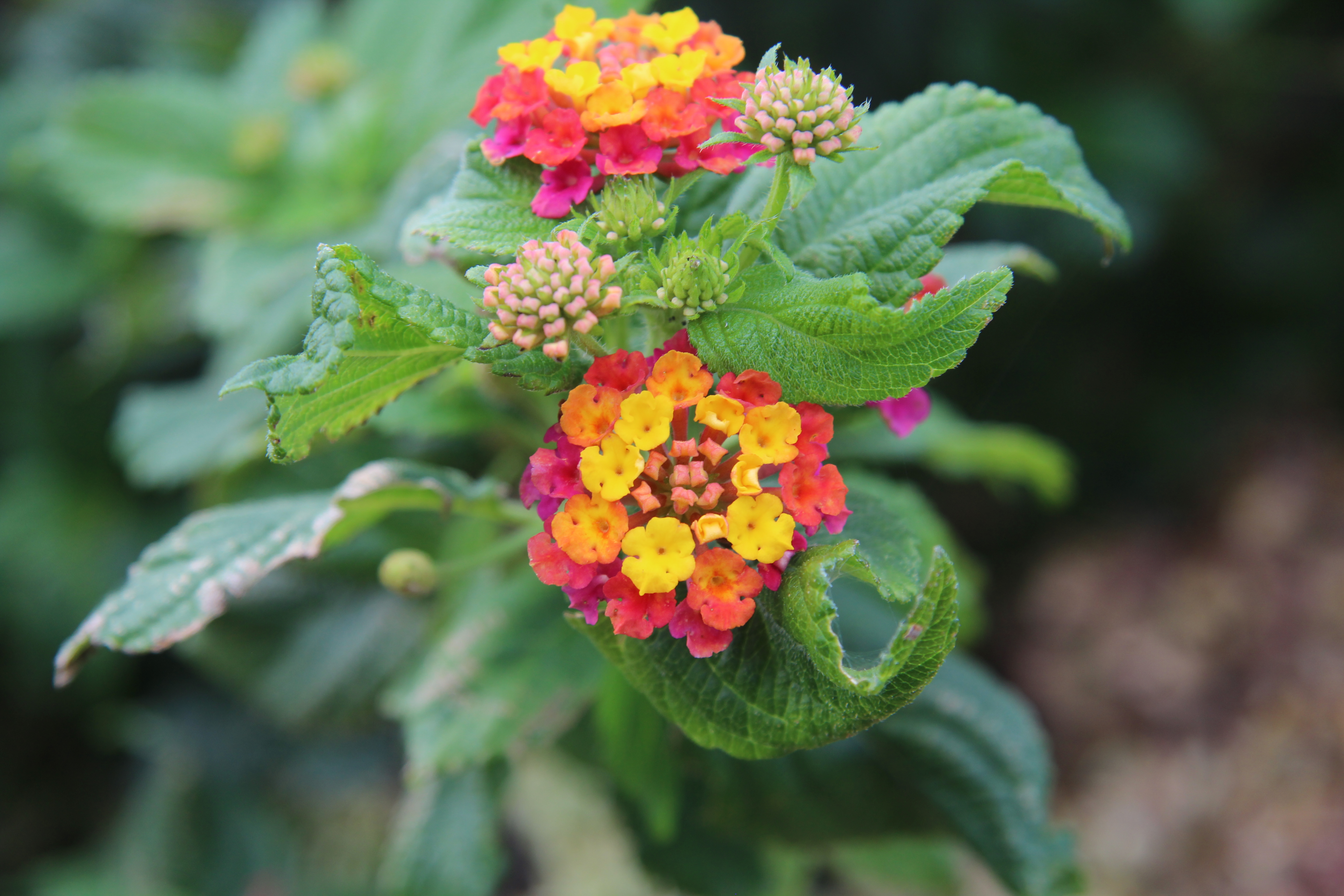 Lantana camara (Wandelröschen) am Miradouro da Eira da Achada, Madeira